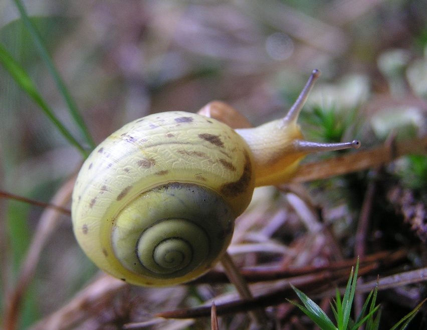 Fruticicola fruticum (syn. Bradybaena fruticum), aufgenommen am Bad Ausseer See (Österreich).